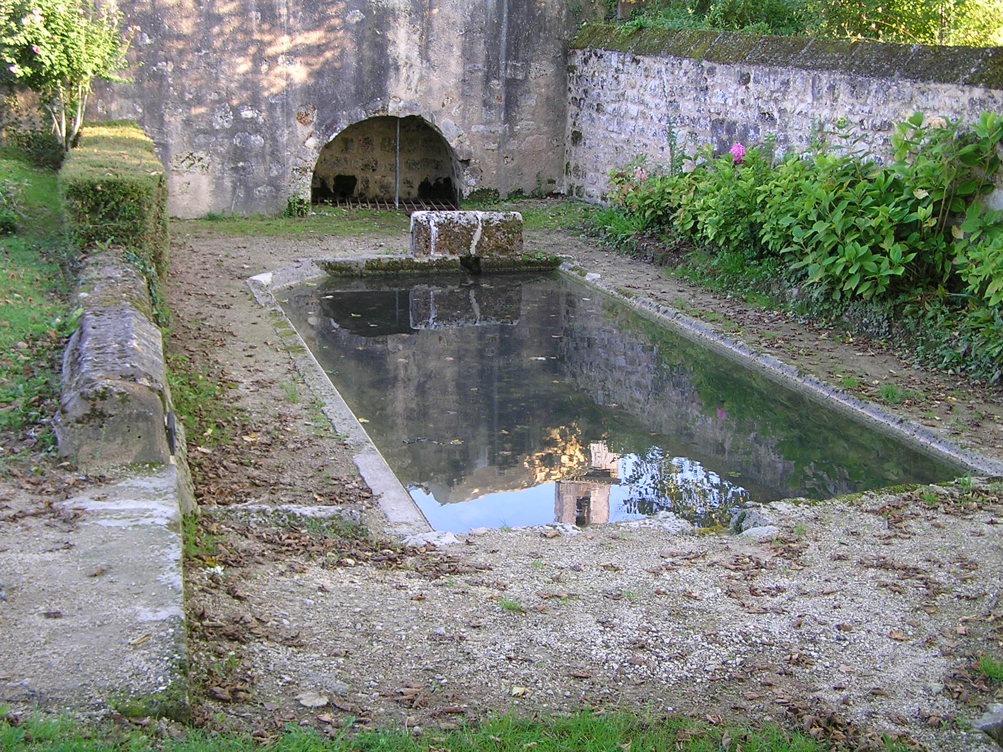 lavoir de Bouëx